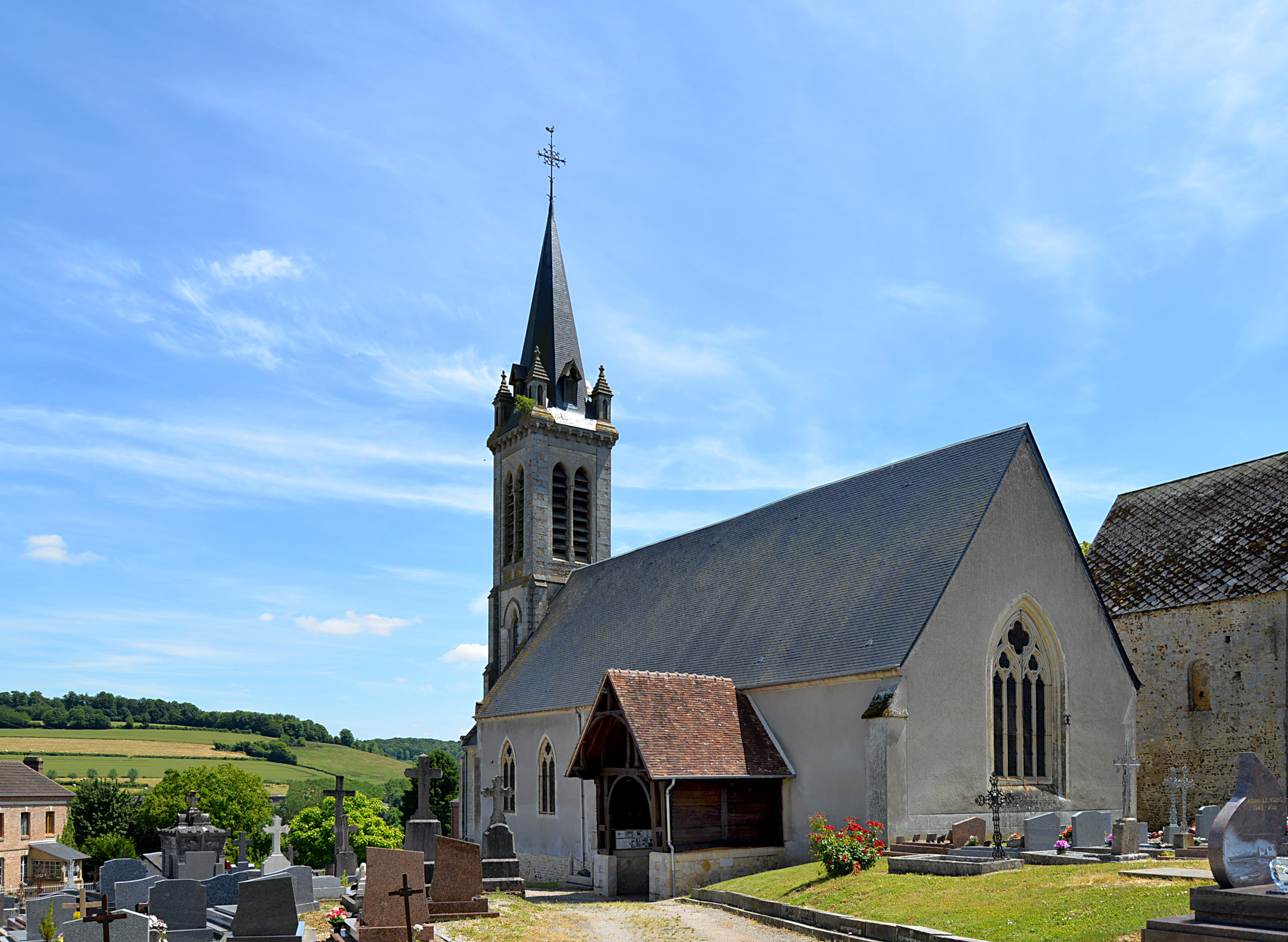 Ticheville (Orne)